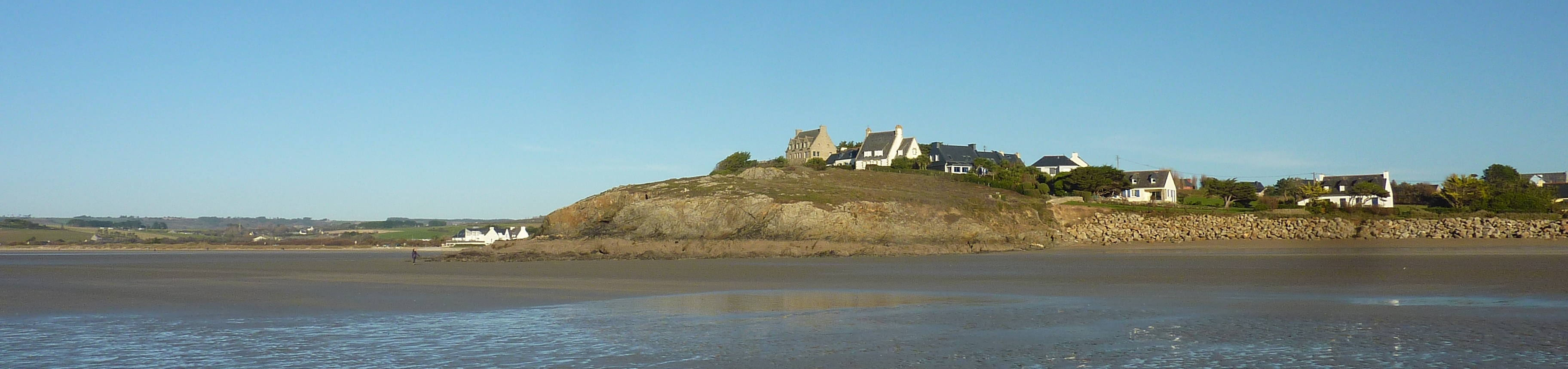 Plomodiern : les falaises entre la plage de Lestrevet (à gauche de la photographie) et de Pors ar Vag (à droite de la photographie).